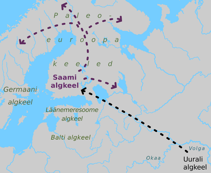 Uurali keele jõudmine Lõuna-Soome. Saami algkeelt mõjutanud naaberkeeled. Saami algkeele laialilevimine Soomes, Karjalas ja Lapimaal. Põhineb Ante Aikio ("An essay on Saami ethnolinguistic prehistory", 2012) ja Asko Parpola ("Formation of the Indo-European and Uralic (Finno-Ugric) language families in the light of archaeology: Revised and integrated ‘total’ correlations", 2012) uurimustel.